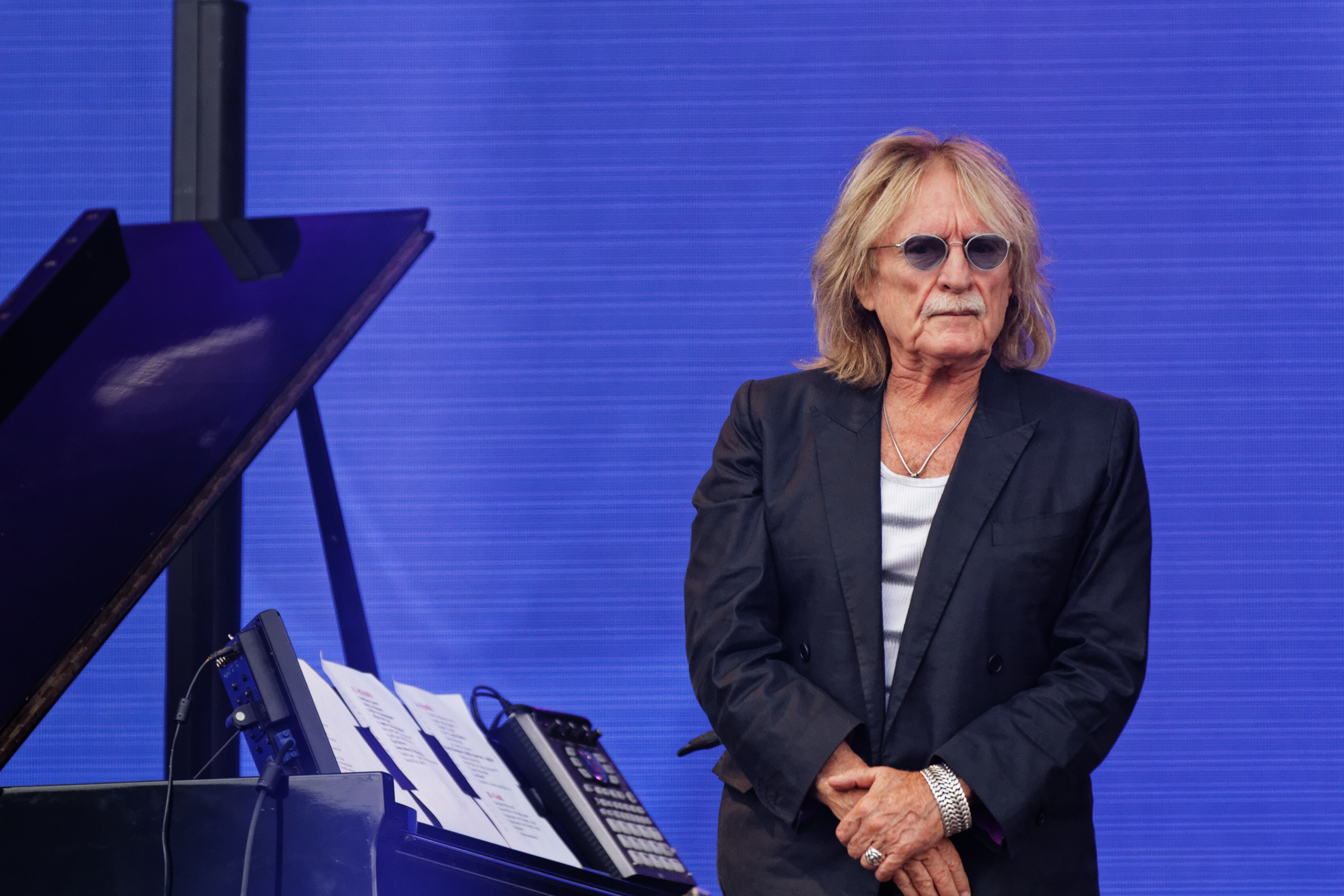 Christophe en concert sur la scène Glenmor lors du festival des Vieilles Charrues 2014.